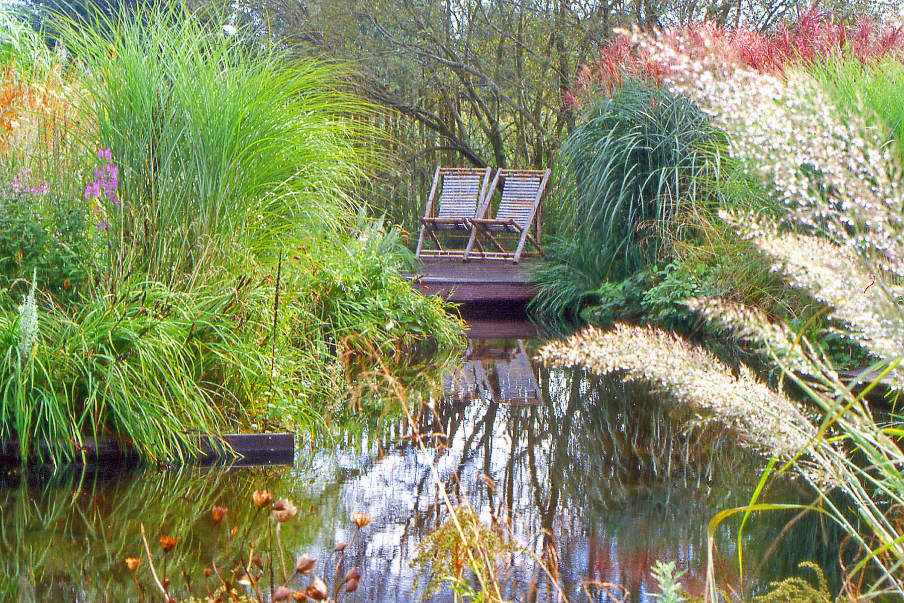 Grassentuin in 1997